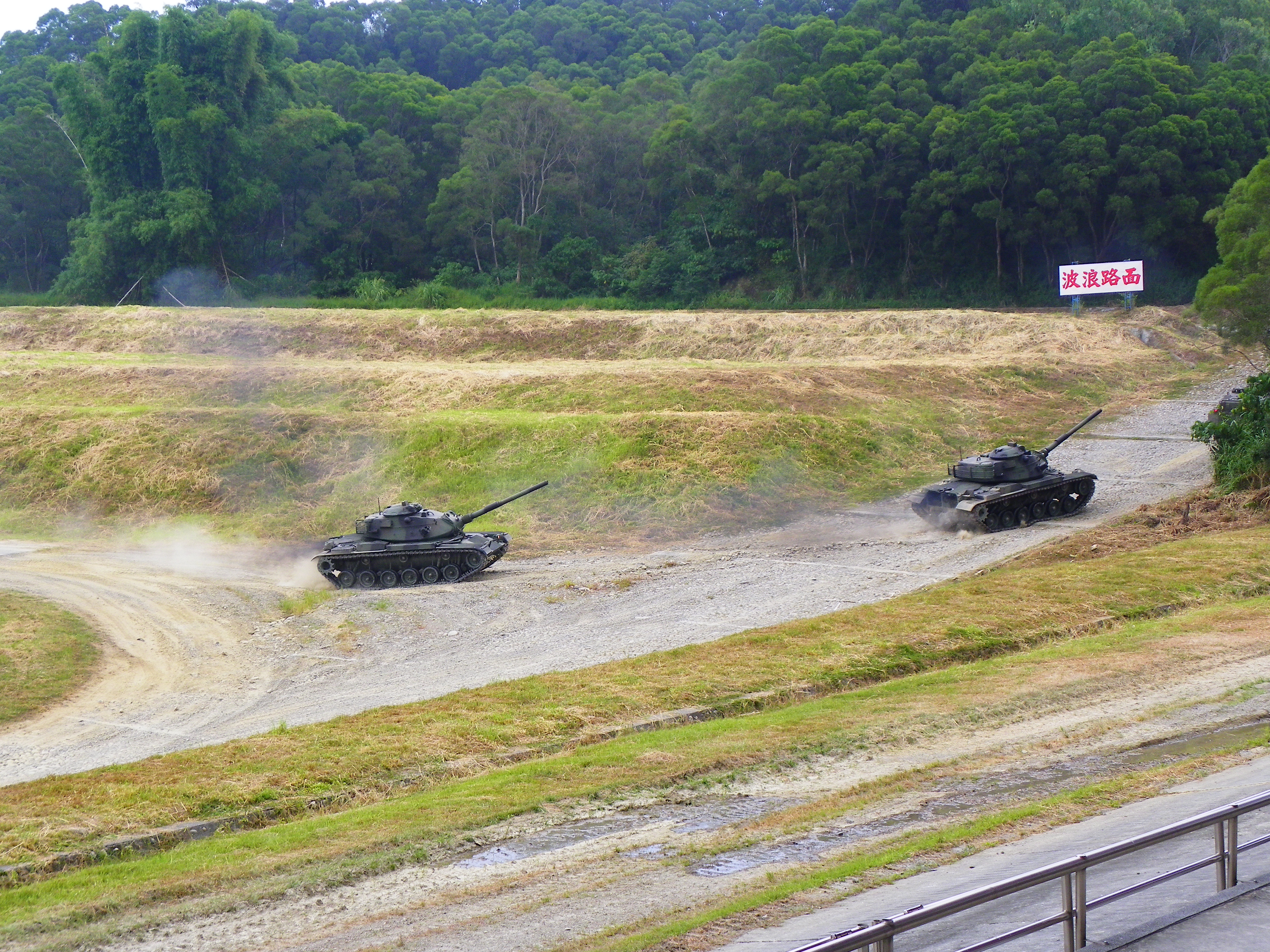 攀登石礫不整路面的兩輛M60A3 TTS戰車。